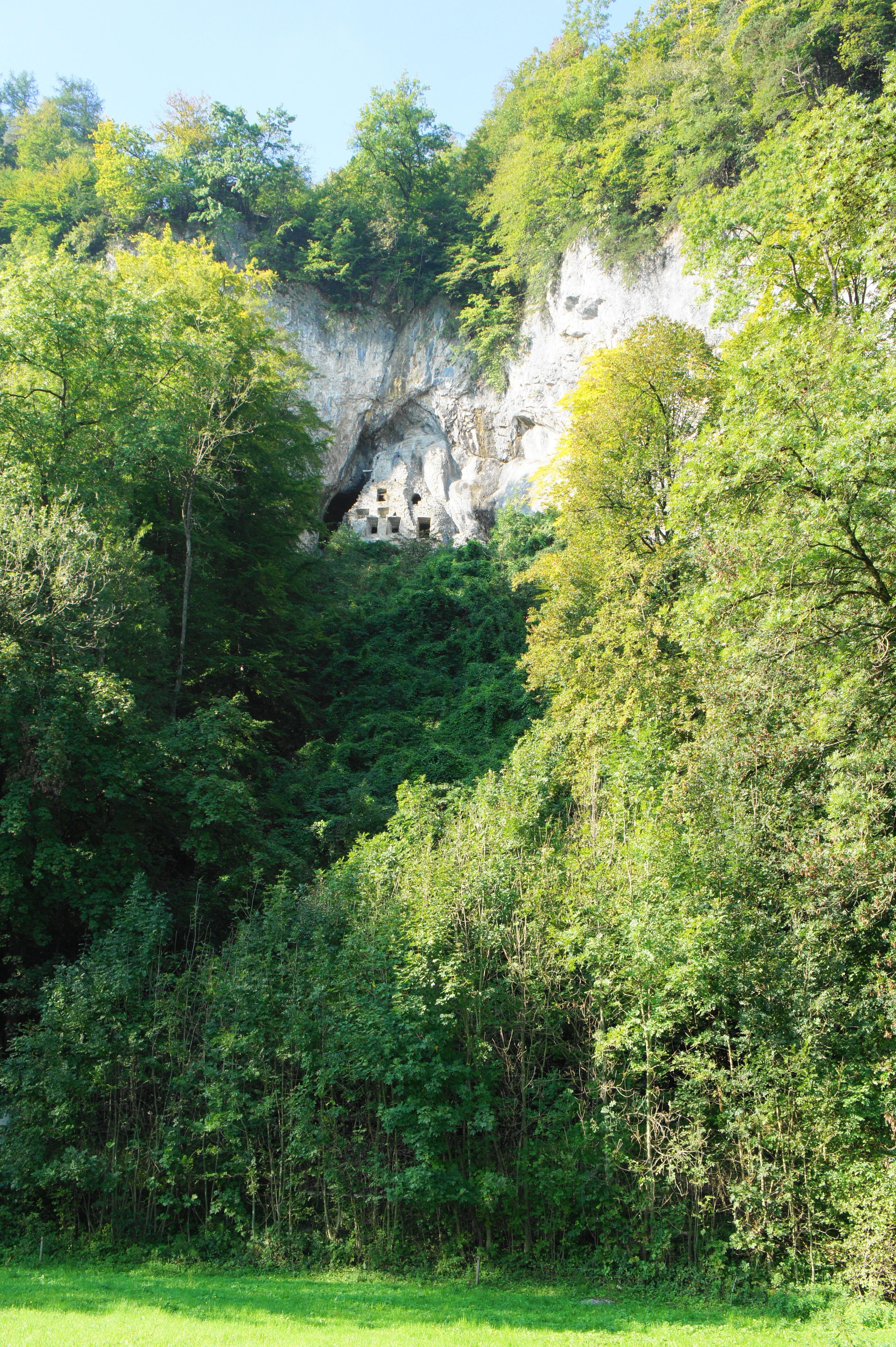 Ruine Wichenstein, Blick zur Höhlenburg hinauf, Standort hinter dem Wichensteiner See